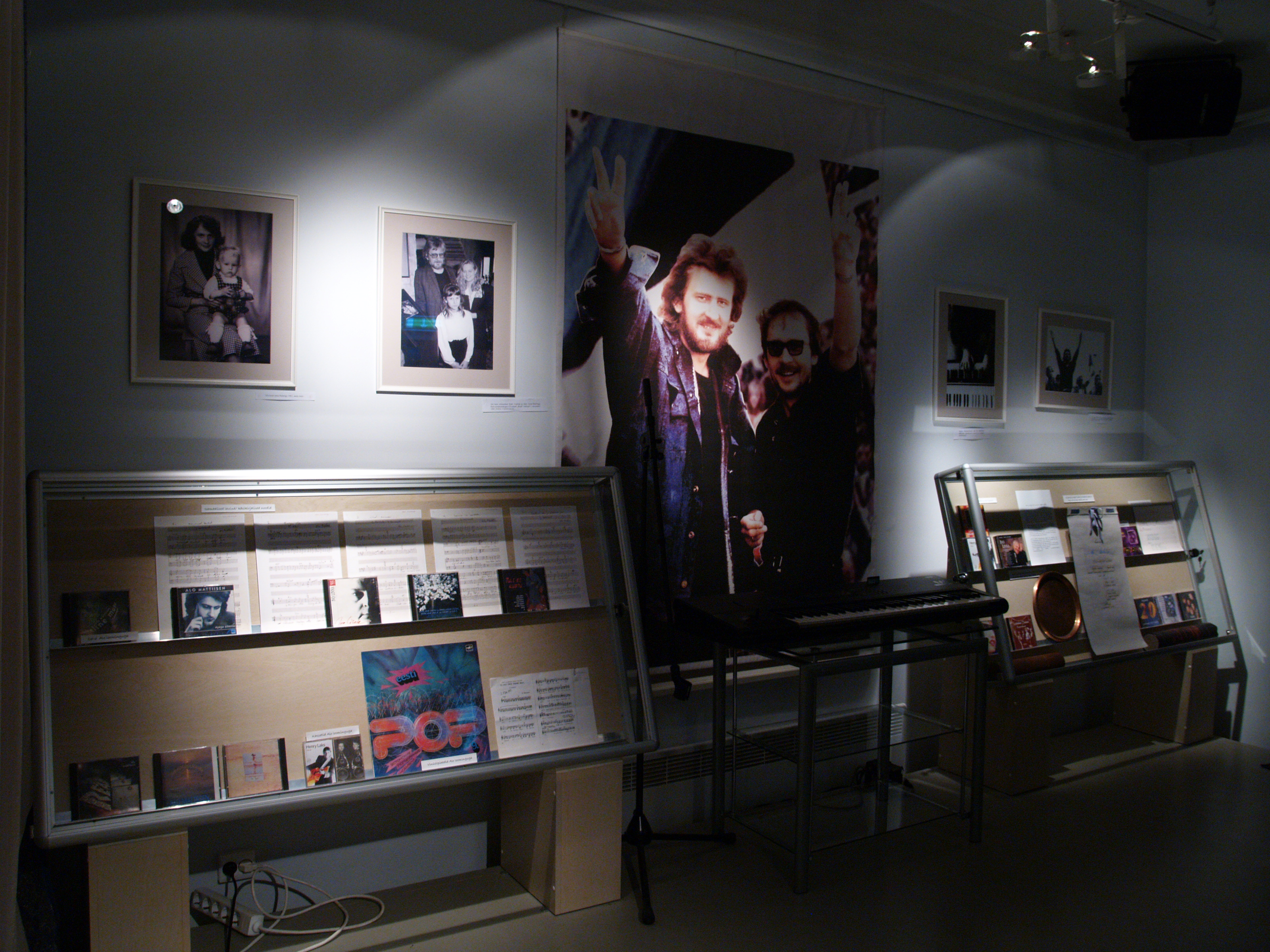 Alo Mattiiseni loomingu ja tegevusega seotud ekspositsioon Betti Alveri muuseumis.